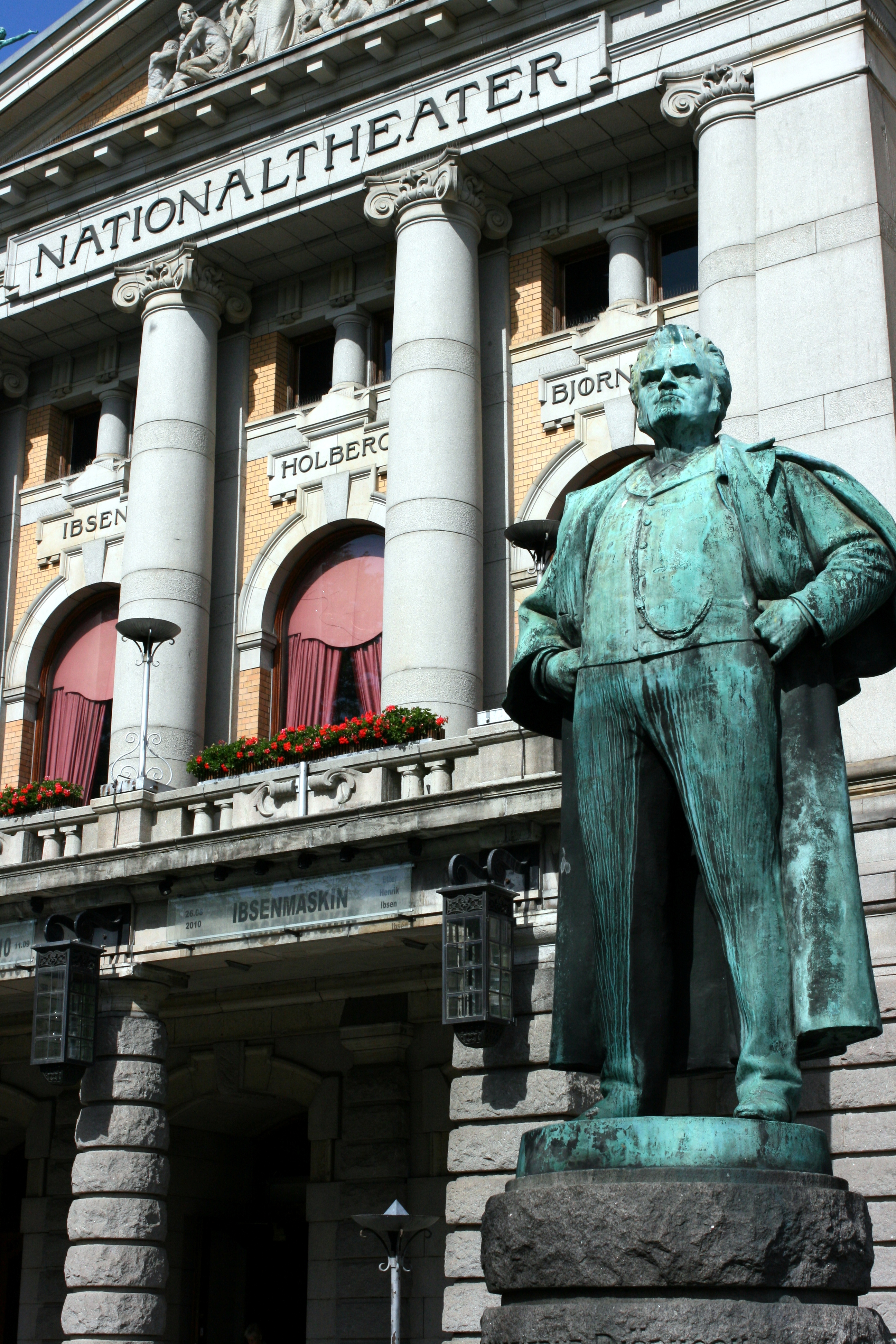 Stephan Sindings statue (1899) av Bjørnstjerne Bjørnson utenfor Nationaltheatret i Oslo.